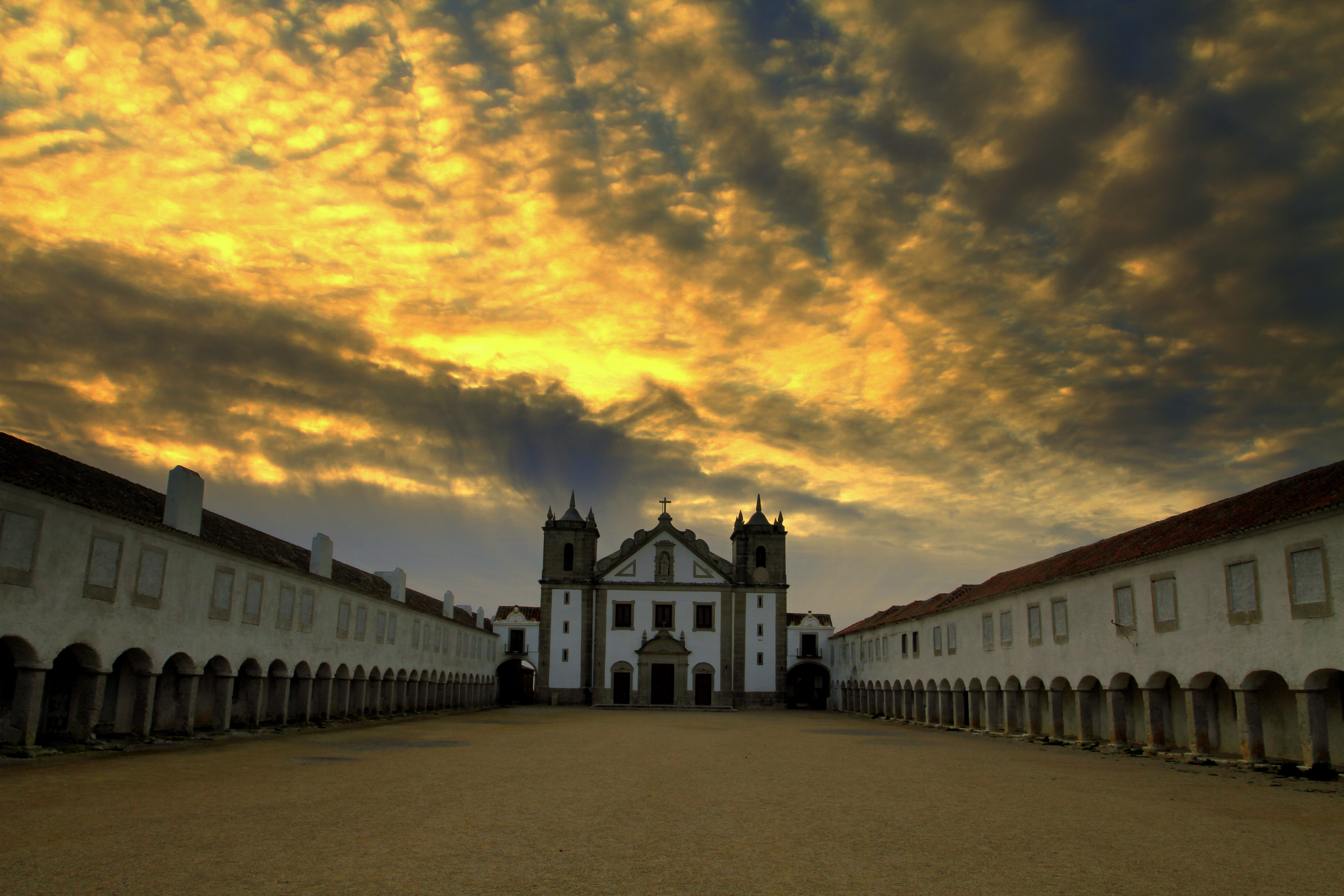 Santuário do Cabo Espichel This file was uploaded for Wiki Loves Monuments in Portugal with the unique identifier 73479.